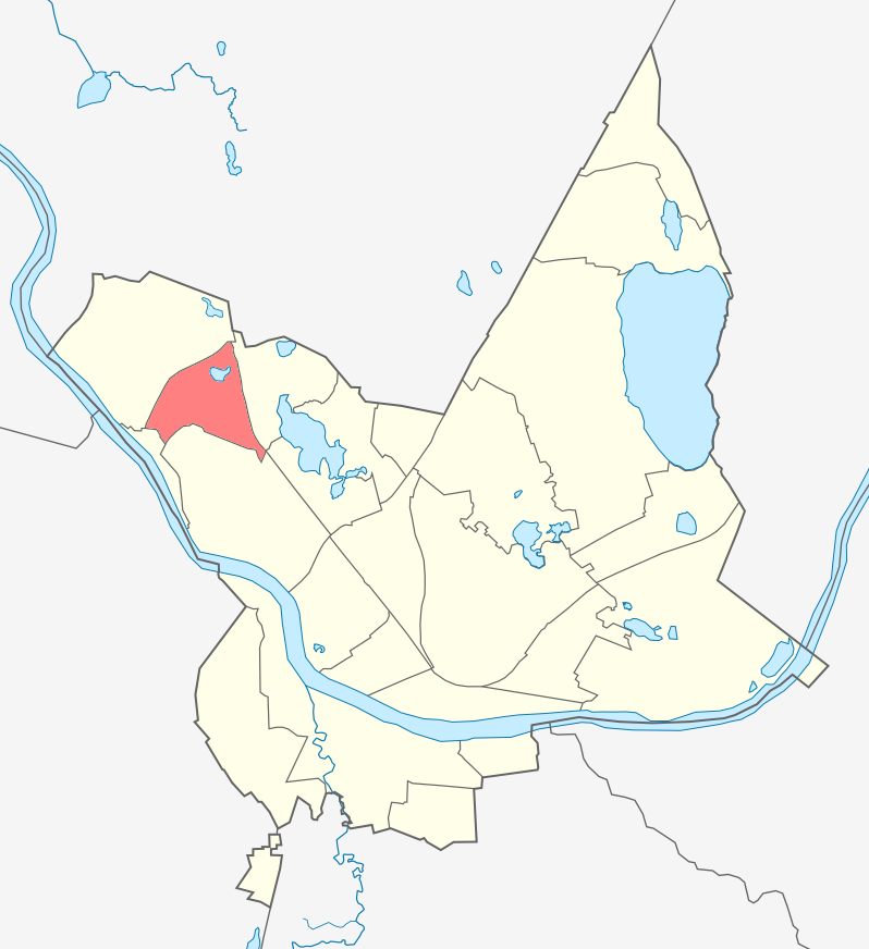 Микрорайон Визбули карте Даугавпилса.